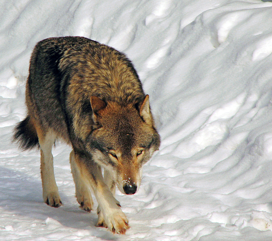 Un lobo caminando sobre la nieve en el safari park Kolmården (Suecia).